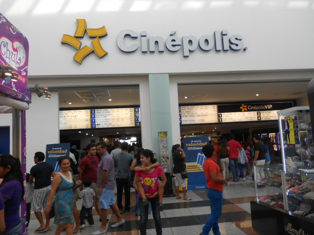 Cinépolis, ubicado en el centro comercial Plaza Las Américas, Cancún, México.